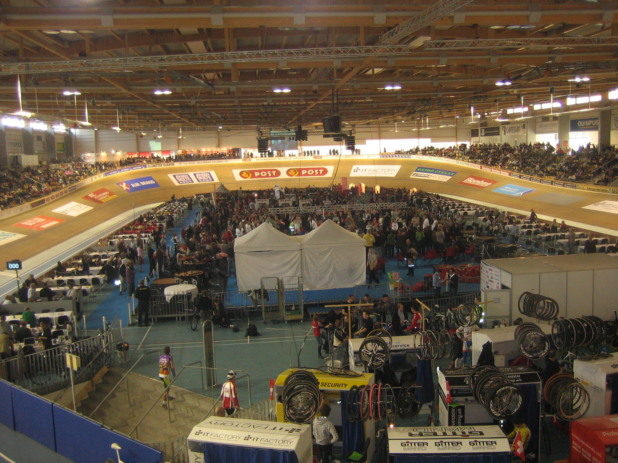 Seksdagesløb i Ballerup Super Arena 2008